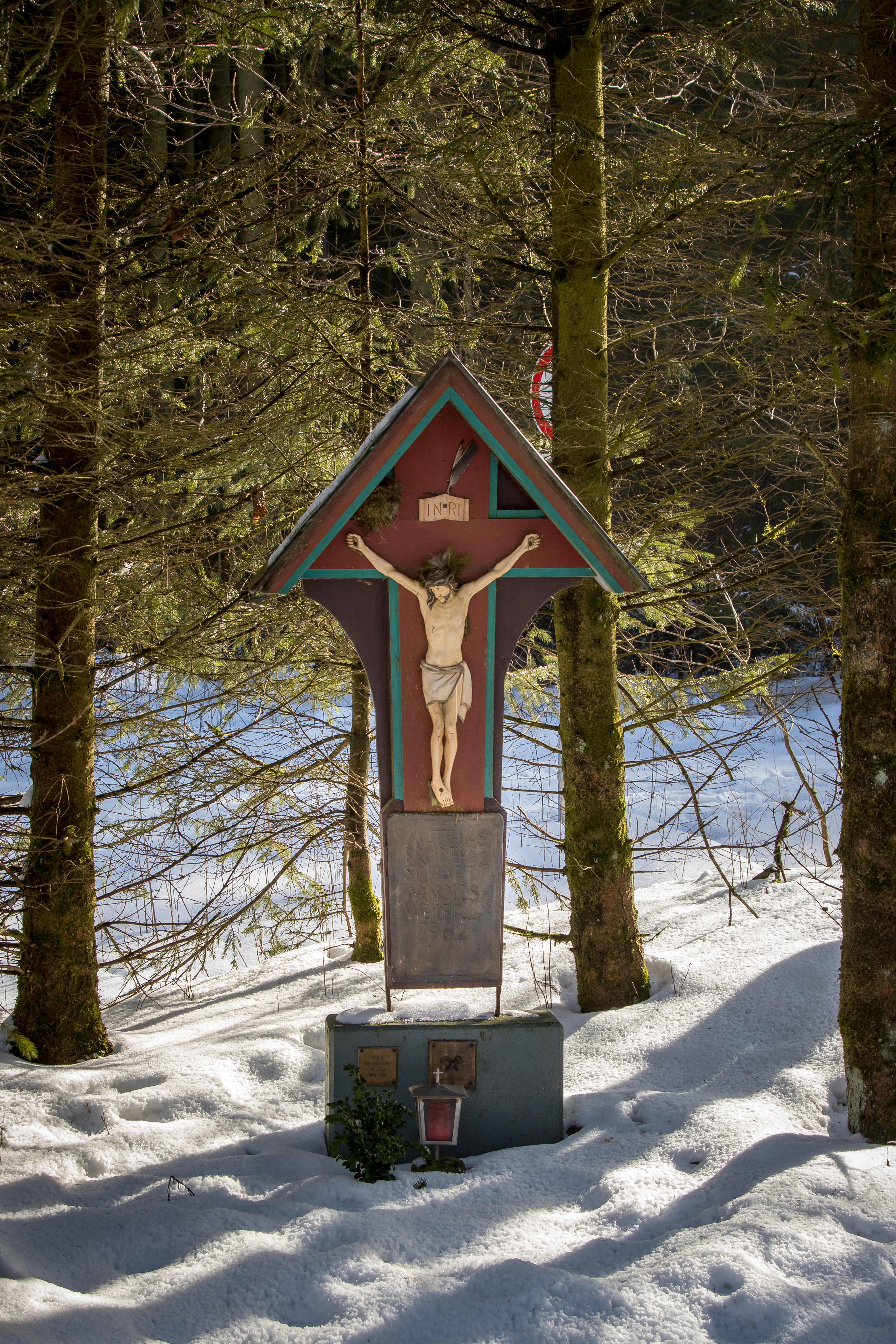 Wegekreuz der Matthias-Bruderschaft Arnoldsweiler bei "Lichte Hardt" zwischen Udenbreth und Dahlem / Eifel